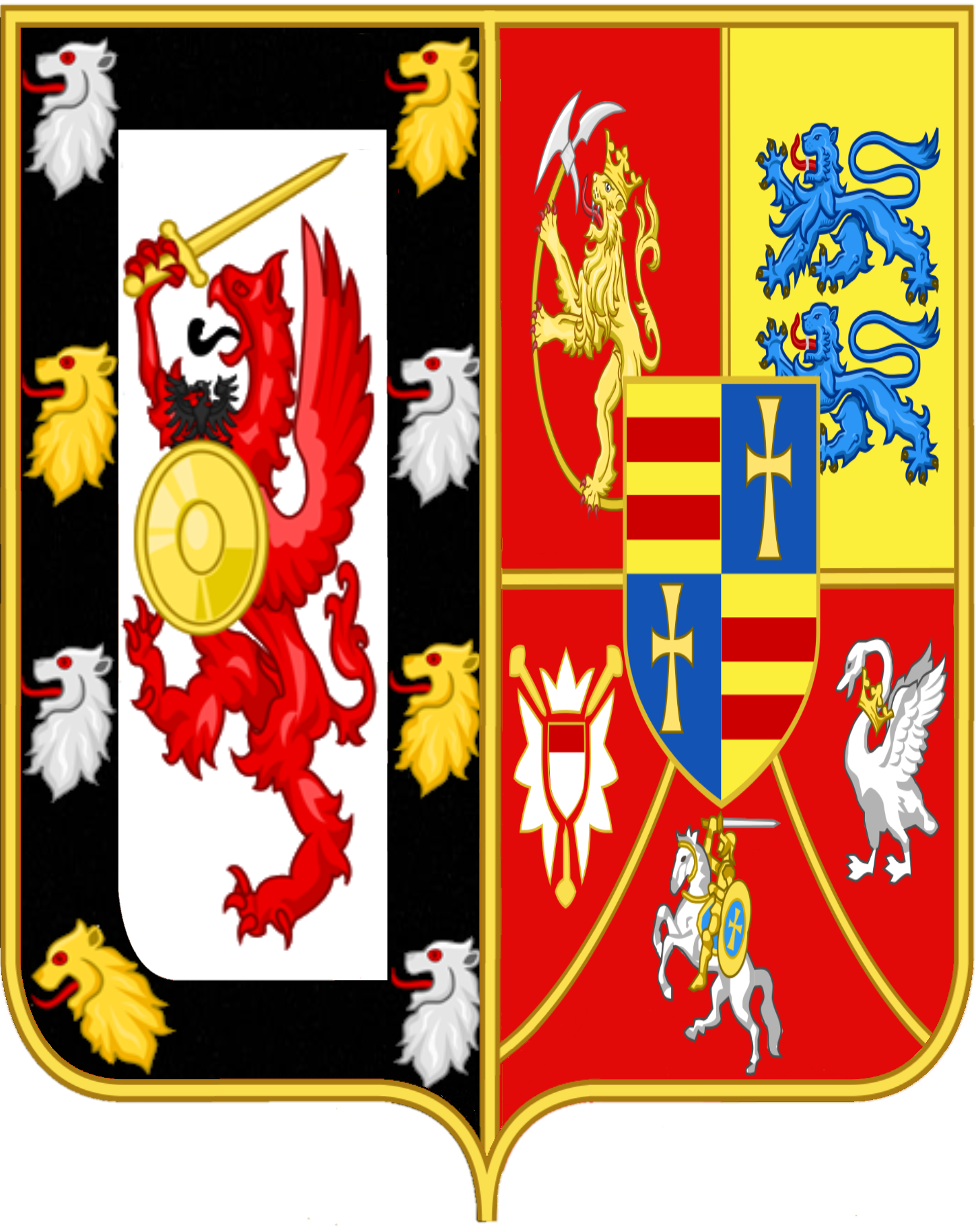 Znak dynastie Holštýnsko-gottorpsko-romanovské